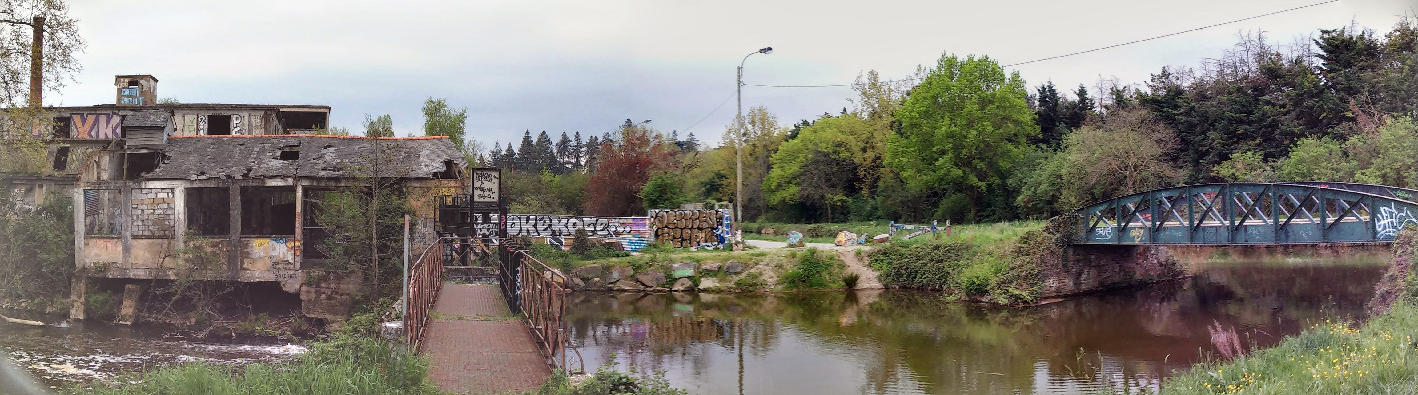 Le site de l'ancienne tannerie du Trublet (avril 2015). Le sud se trouve à l'horizon ; le canal à droite.